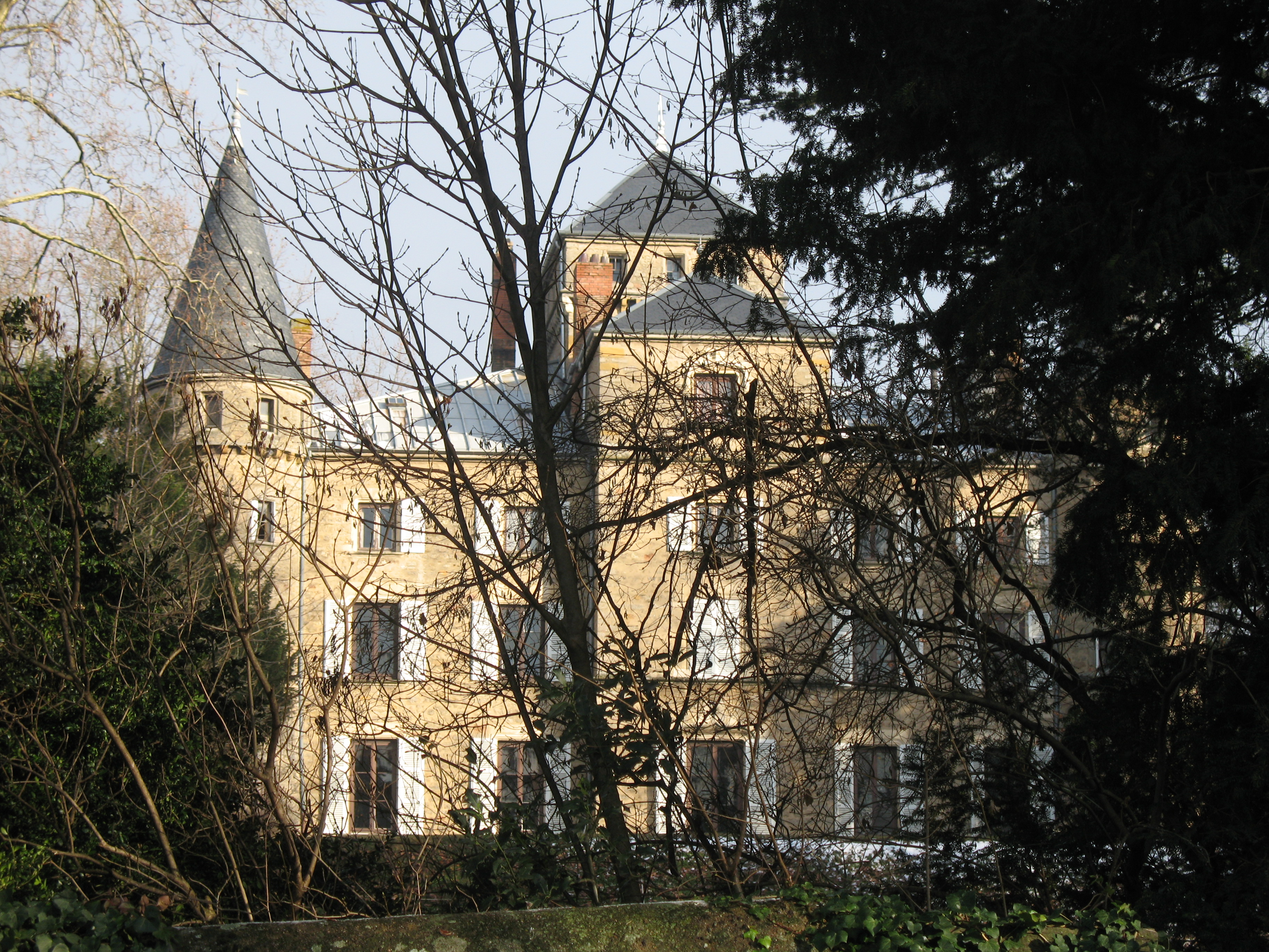 Château de la Combe à Saint-Germain-au-Mont-d'Or dans le Rhône.